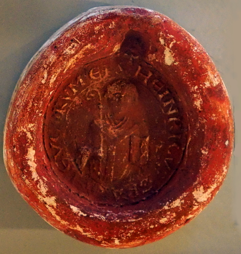 présenté lors de l'exposition.